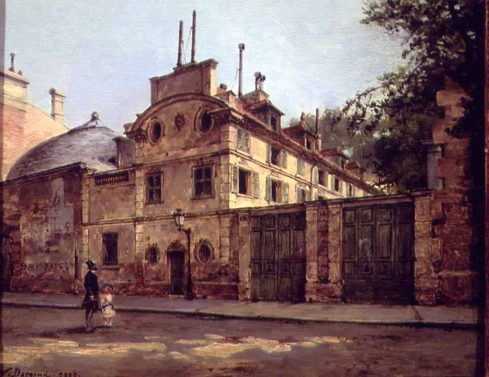 La maison de Honoré de Balzac, rue Fortunée